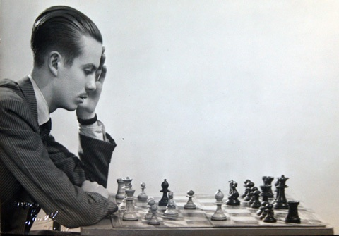 Héctor Rossetto en su juventud, frente a un tablero de ajedrez.